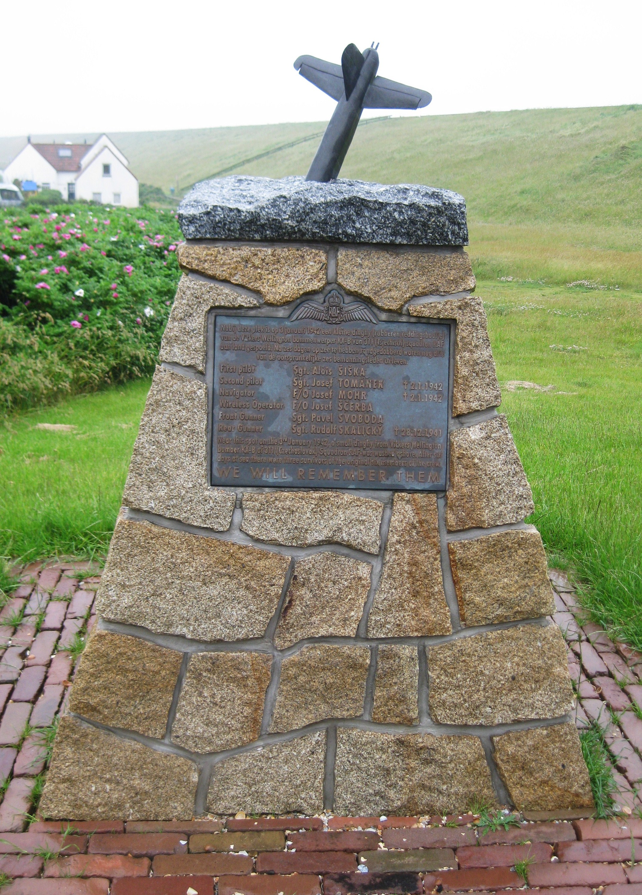 Gedenkteken voor de Tsjechische bemanning van een Vickers Wellington bommenwerper van de RAF die in januari 1942 in de Noordzee stortte, Petten, Noord Holland. 2012